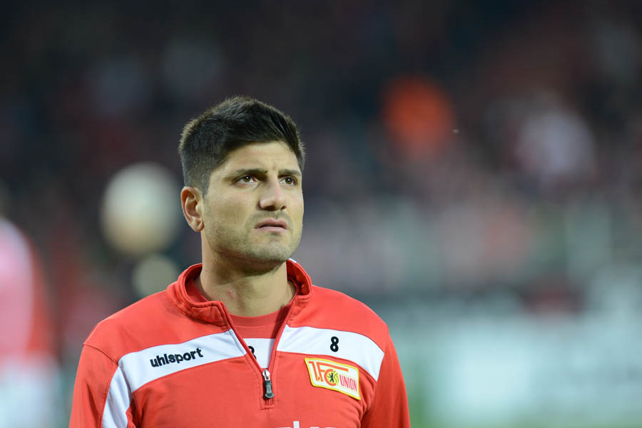 Baris Özbek beim Aufwärmen